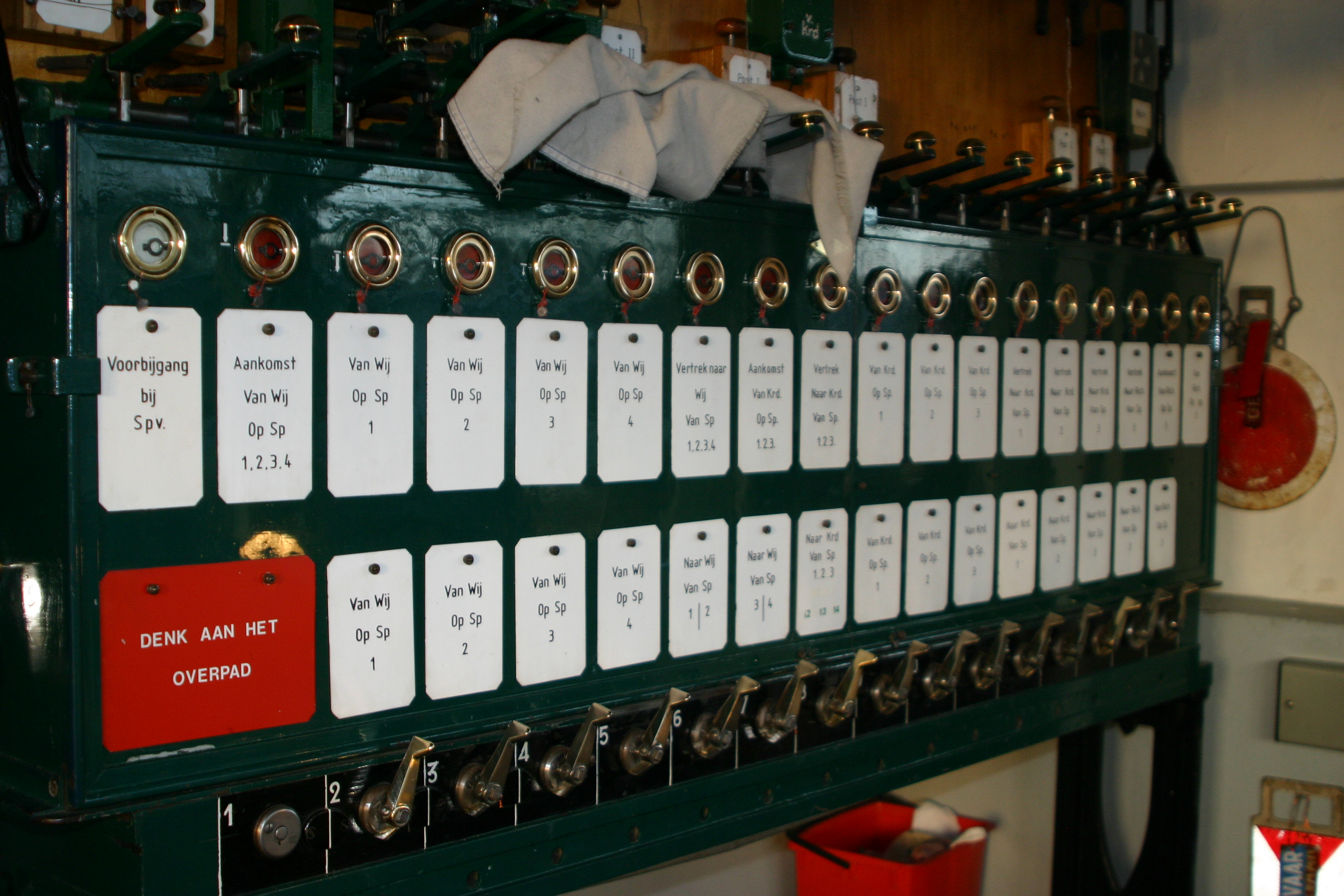 Stellwierk vu Simpelfeld (Blockapparat mat Hiewelbänk)